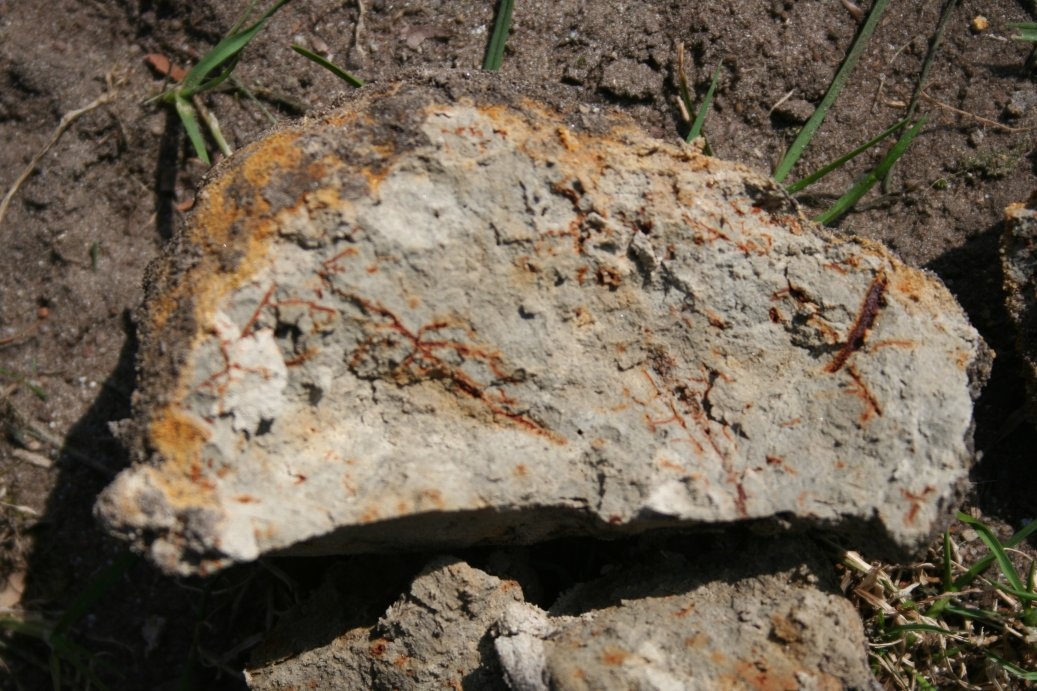 IJzersporen in een zandbodem, de kluit is op 1 meter diepte opgegraven. De oxidatie van ijzer is zichtbaar als bruine 'gangetjes'. Duurt de oxidatie lang genoeg dan ontstaat er ijzeroer op die plekken. – Zelf gemaakte foto van een (beginnende) Gleygrond met sporen van reductie en oxidatie: Gley2.jpg